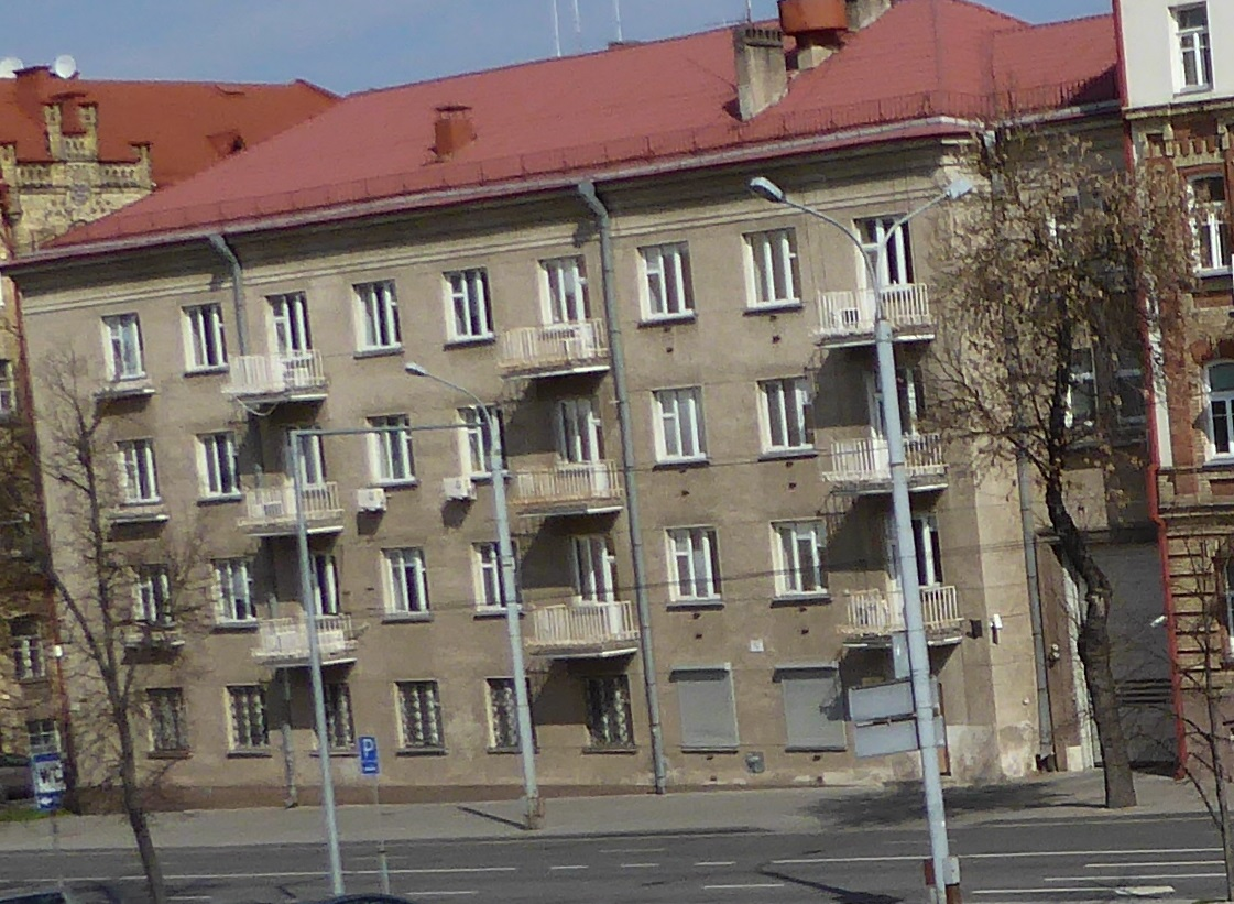 Vadovybės apsaugos departamento buveinė.